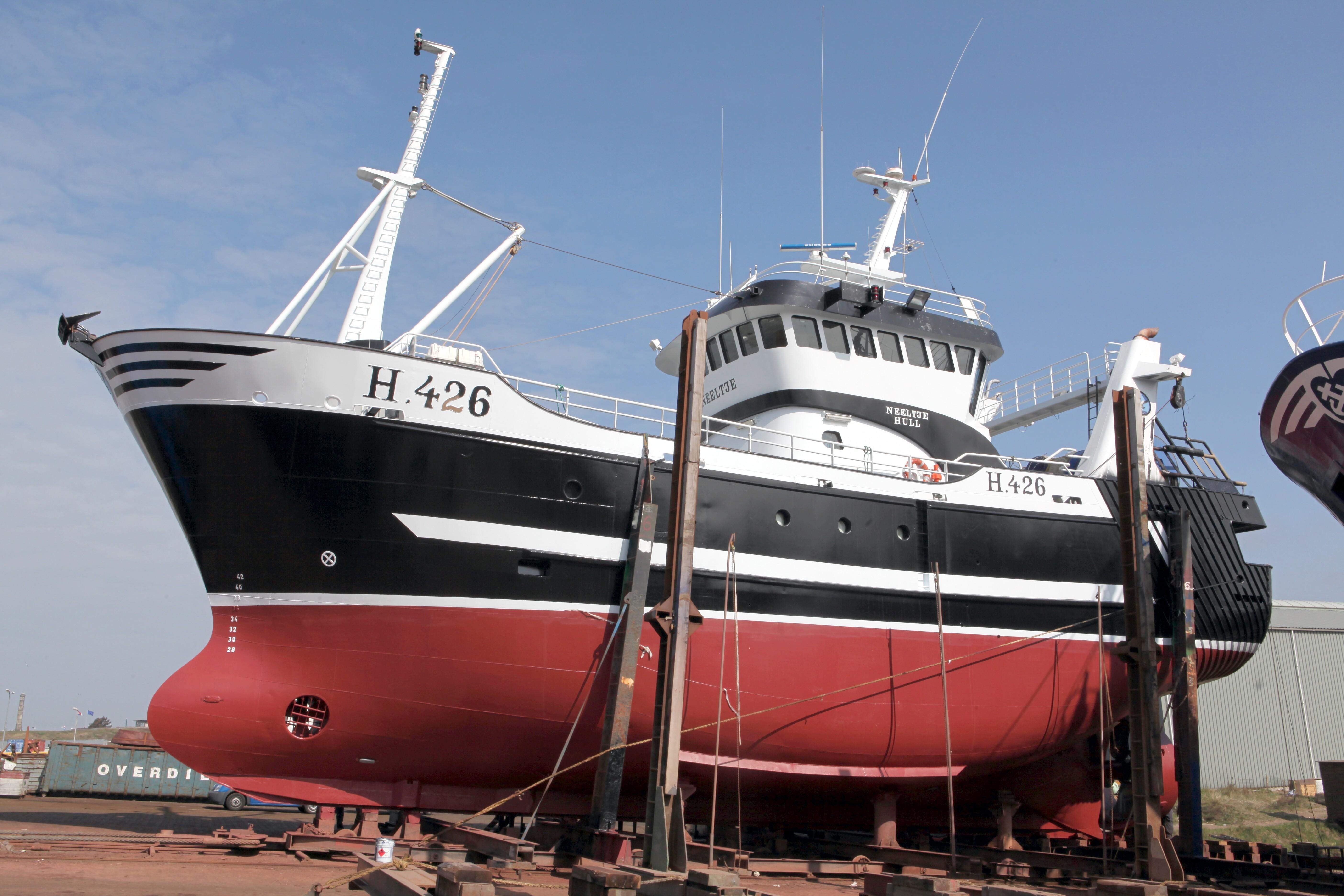 H - 426 Neeltje Hull